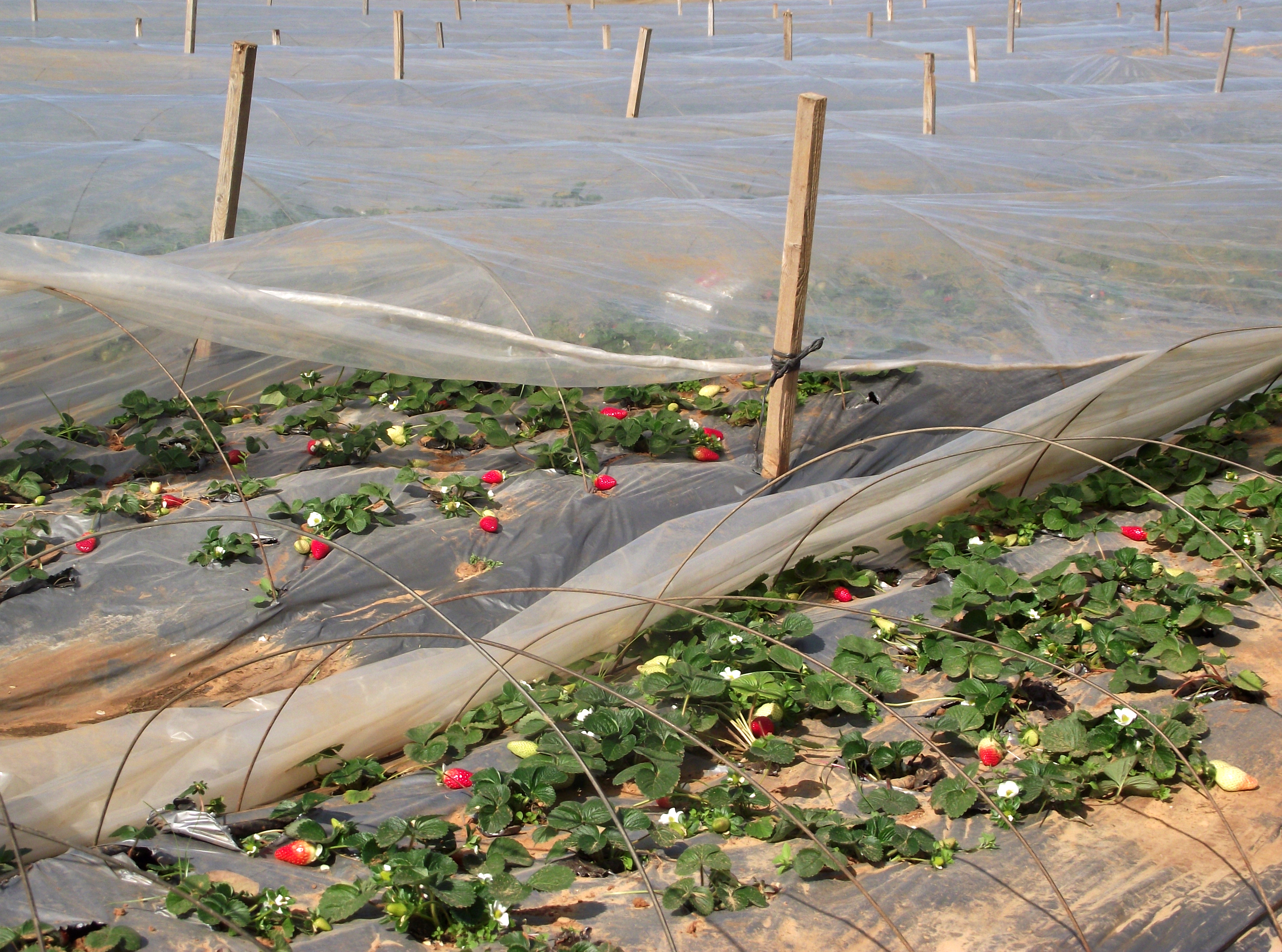 תות שדה רמת השרון תיכון רוטברג